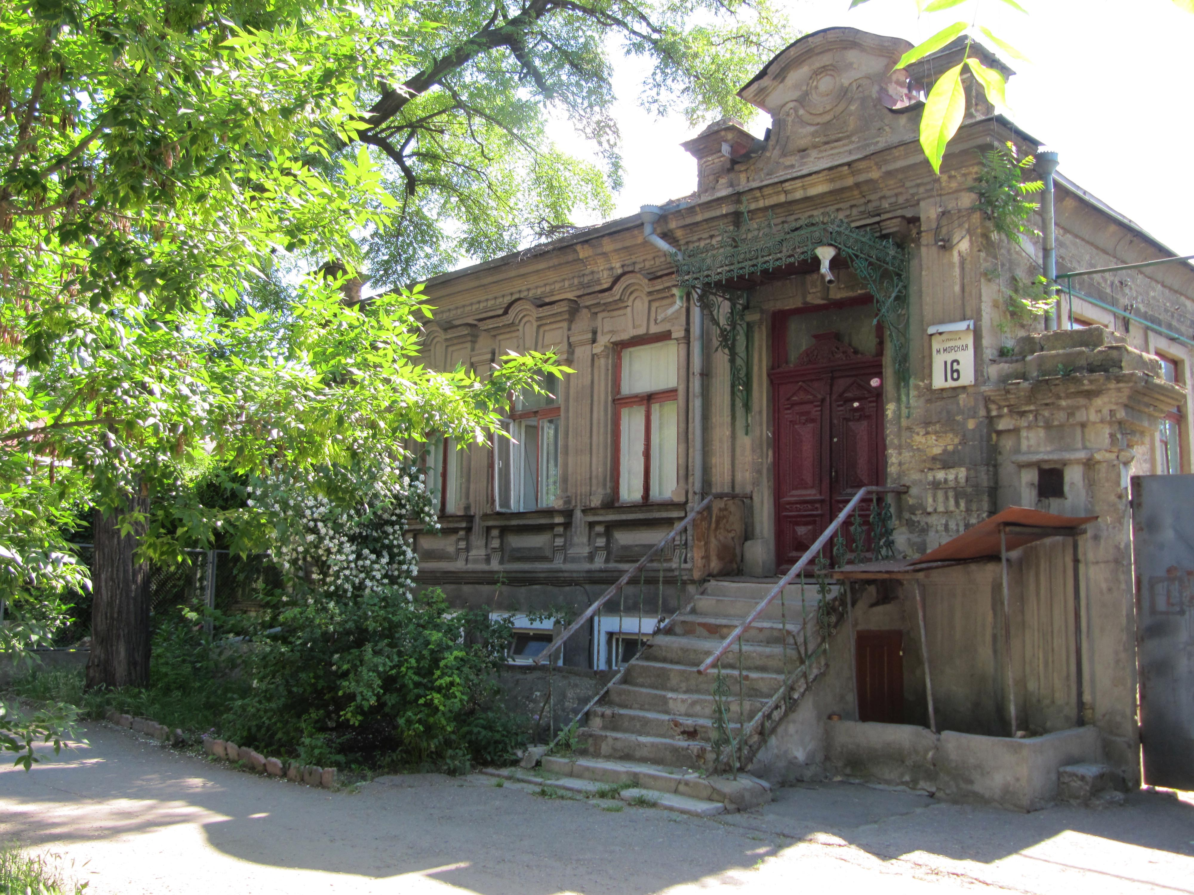 Житловий будинок на вулиці Малой Морській,16, м. Миколаїв Миколаївська весна у Вікіпедії